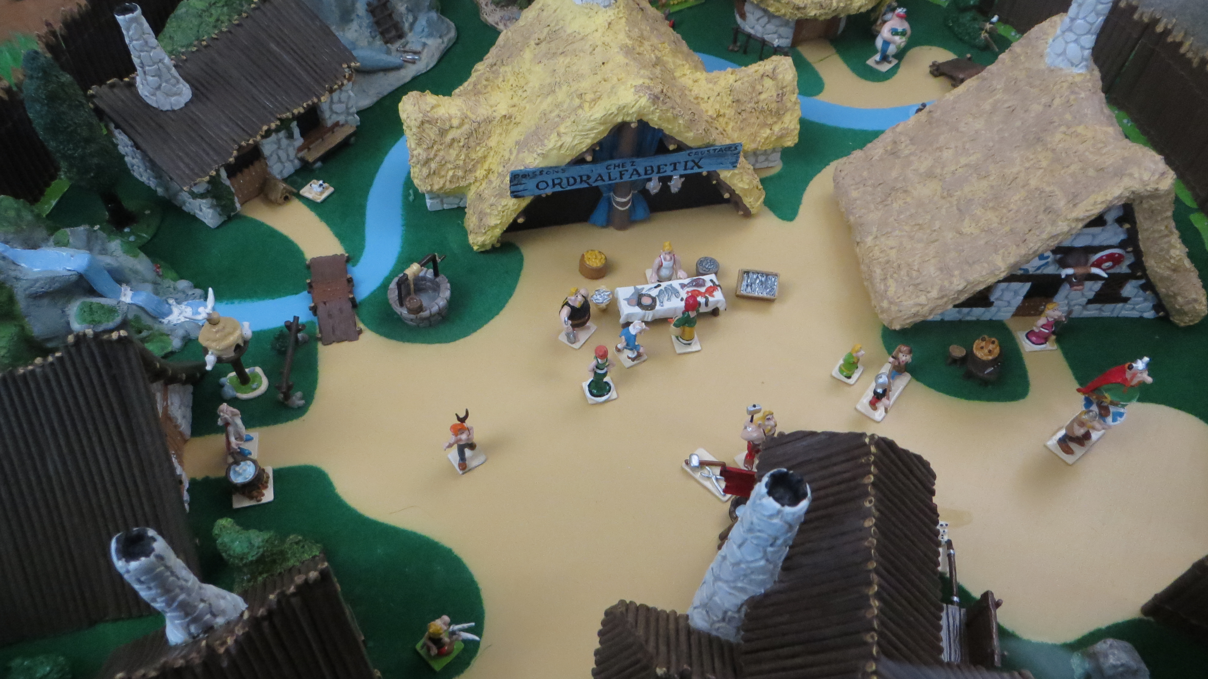 aufgenommen im LWL-Römermuseum in Haltern am See